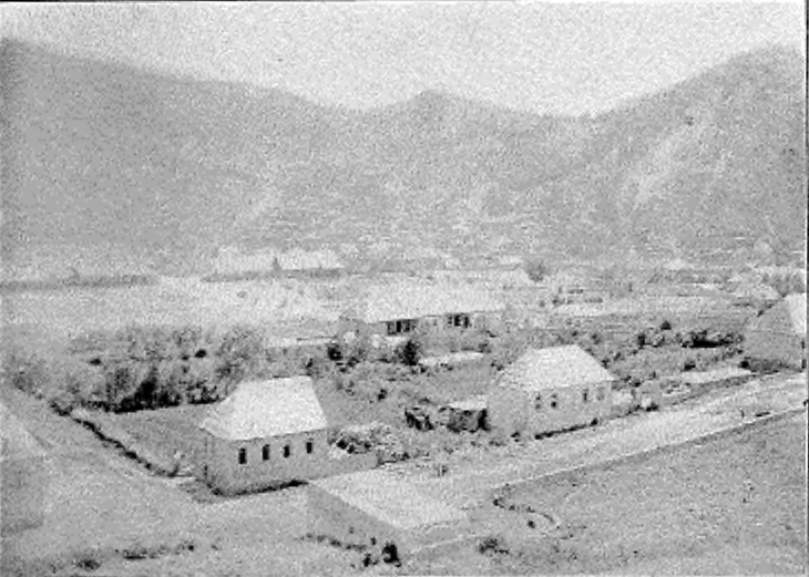 Лагерь для ссыльных по религиозным убеждениям в армянском селении Гирюсы (ныне г. Горис в Армении)